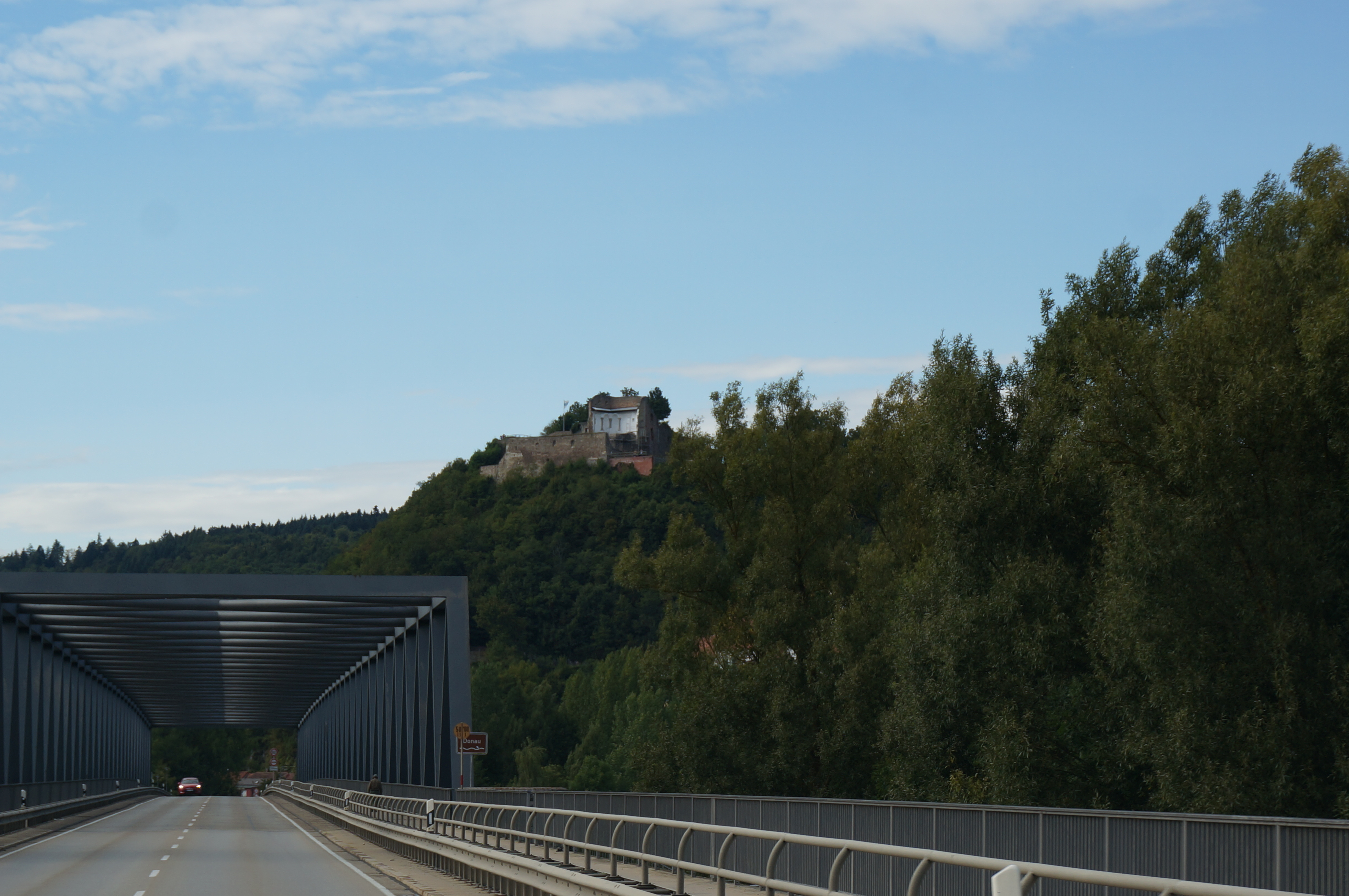 vue de Donaustauf .